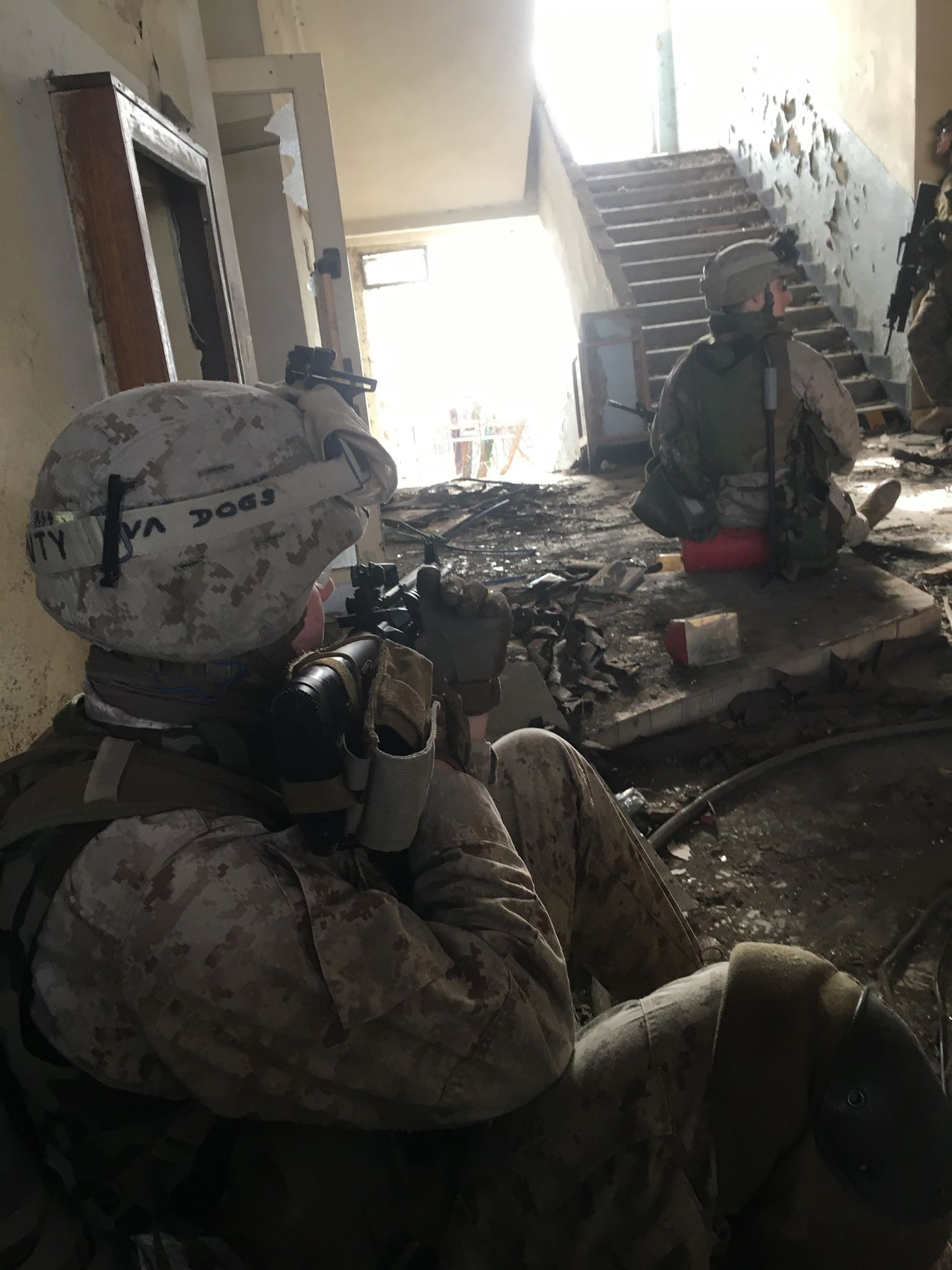 Americký mariňák z 1.praporu, 3.pluku během dobývání města Fallúdža, při druhé bitvě.